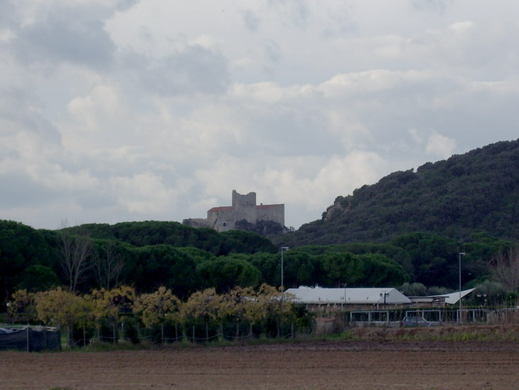 Il Forte delle Rocchette (GR) visto dall'entroterra